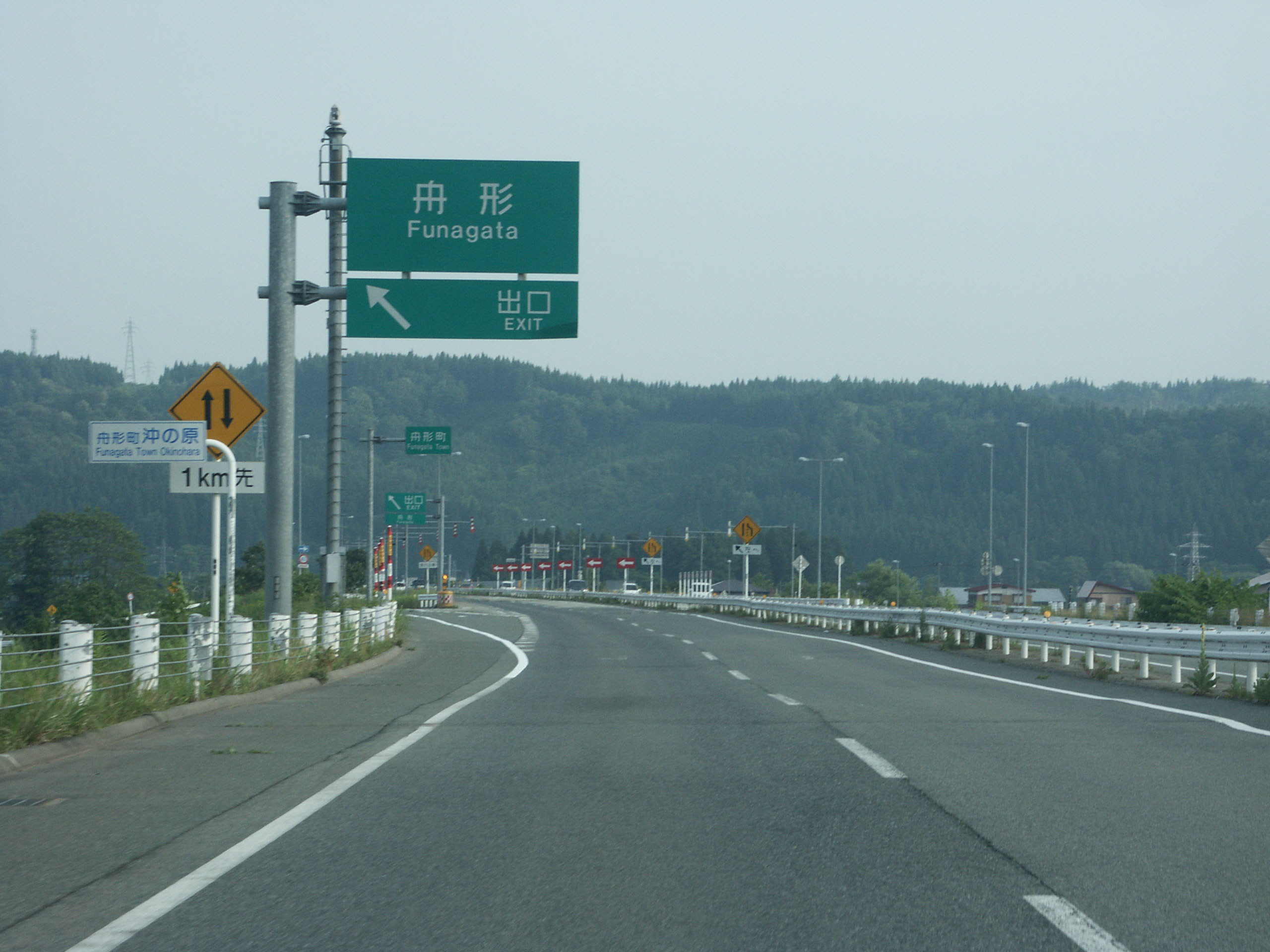 尾花沢新庄道路 舟形IC 出口付近